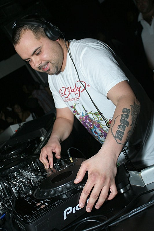 Juan MAgan pinchando en una discoteca